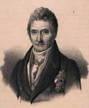 Beskrivelse: Johan Sigismund von Møsting (2.11.1759-16.9.1843) dansk gehejmestatsminister